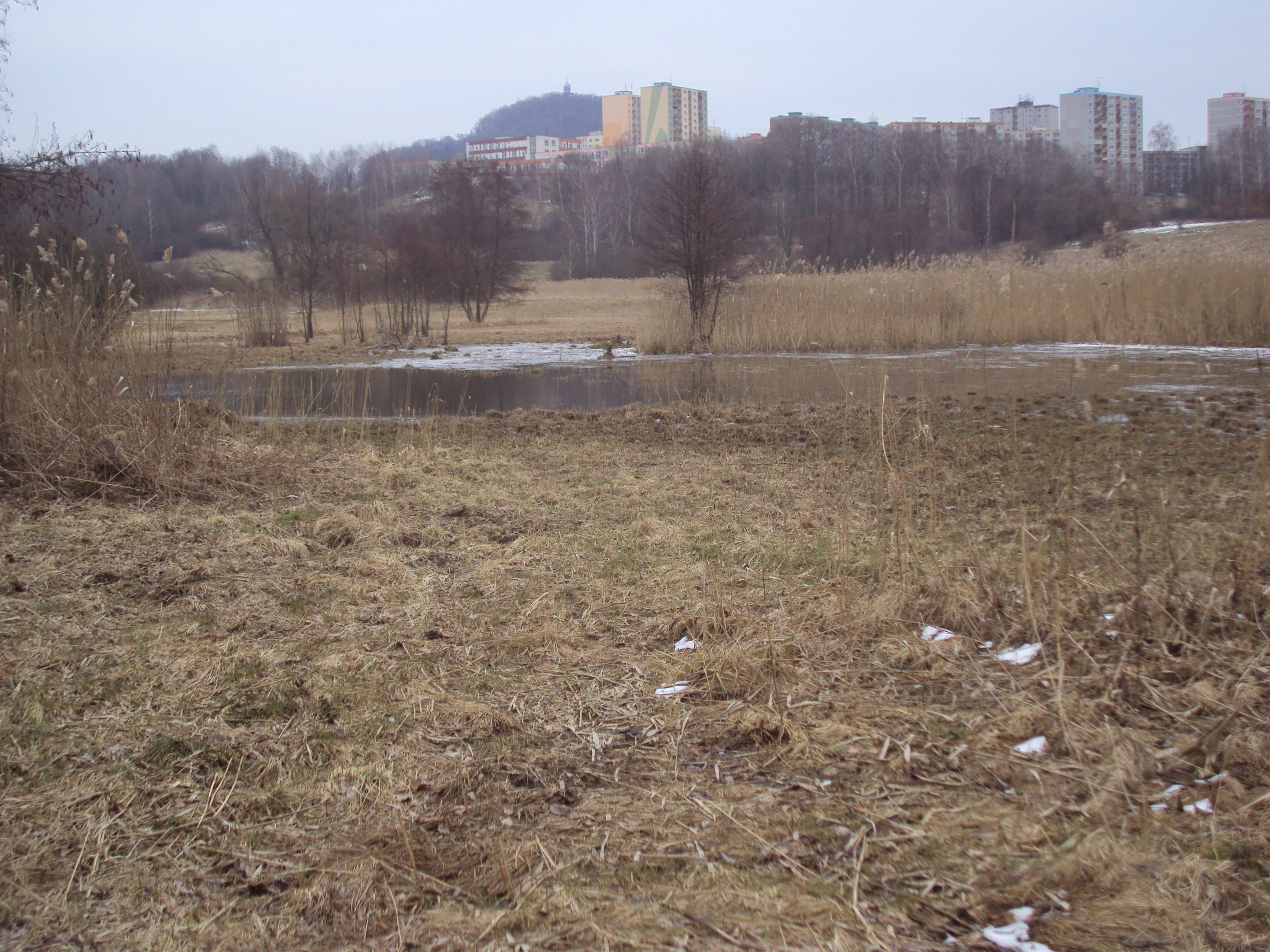 Přírodní památka Mokřad Šporky u města Česká Lípa